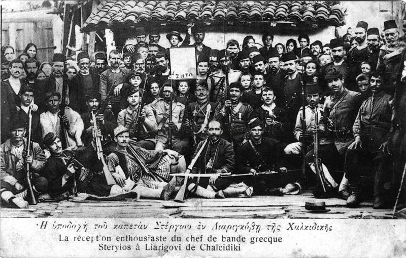 Посрещане на четата на гръцкия андартски капитан Стерьос Влахвеис в село Леригово след Хуриета.